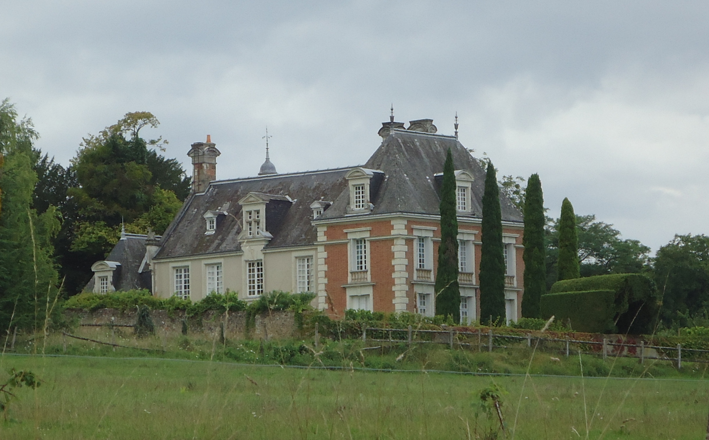 Château de Gennevraye - Aubigné-Racan - Sarthe (72)